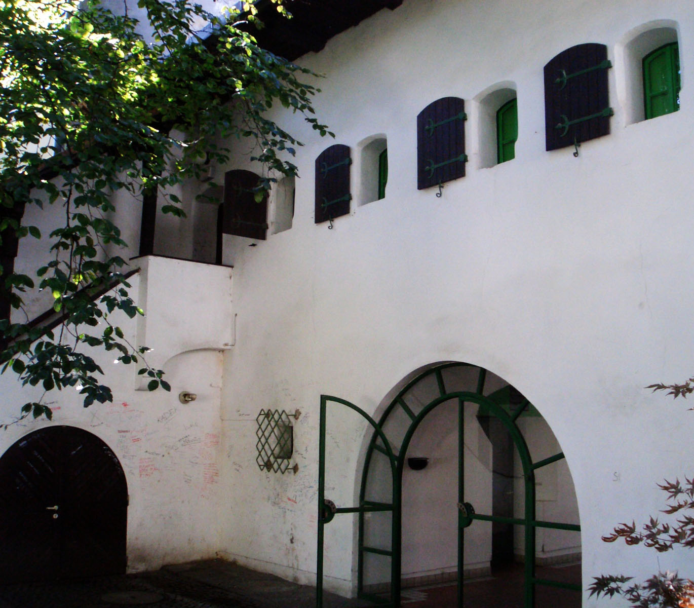 Hinterseite des Kornspeichers in Wels